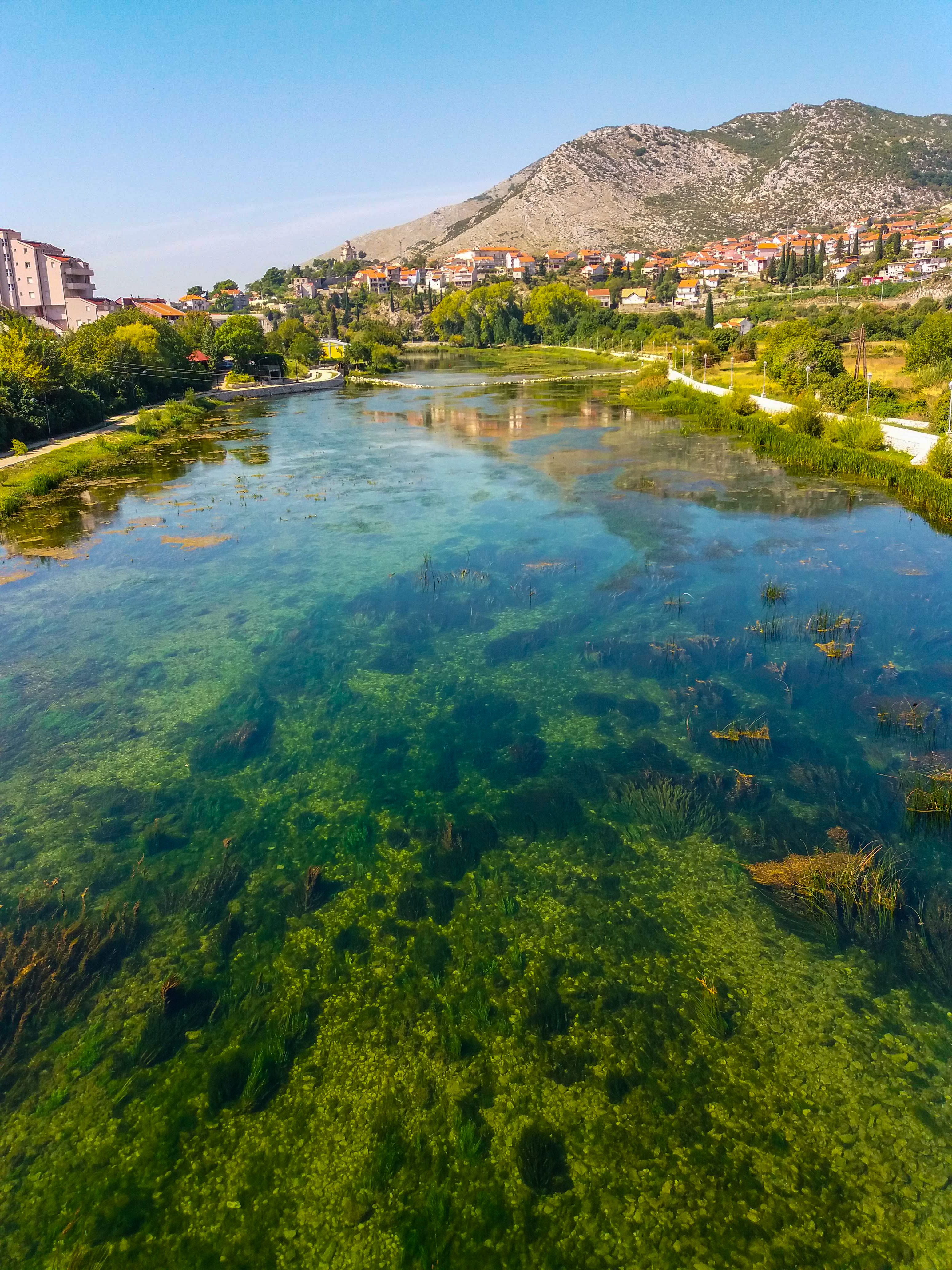 Srpski (latinica): Prostora i kulturno-istorijska celina Trebinje This image was uploaded as part of Trace of Soul 2019.